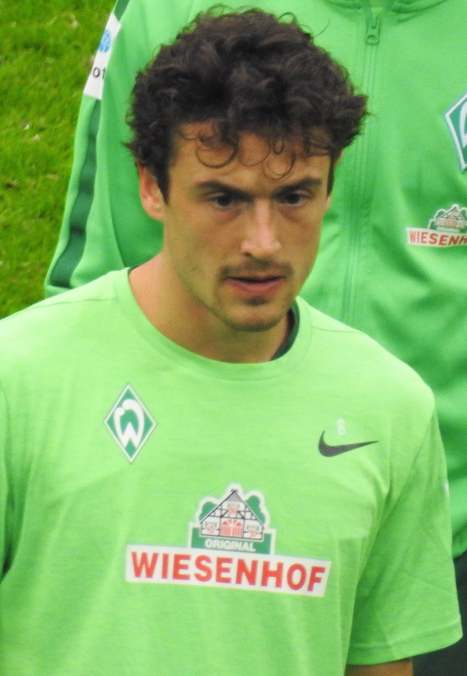 Thomas Delaney, Werder Bremen